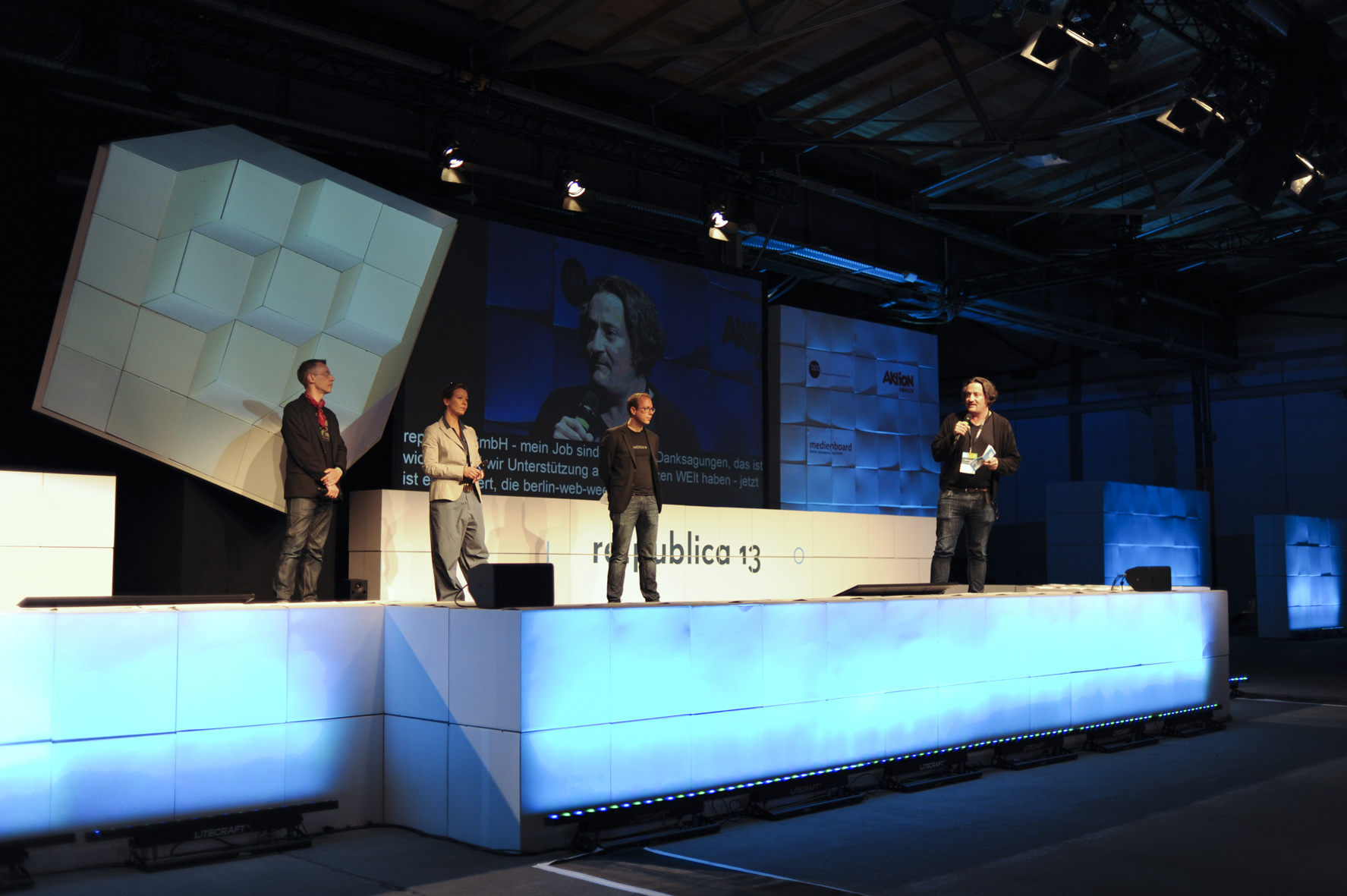 Johnny Haeusler, Tanja Haeusler, Markus Beckedahl und Andreas Gebhard